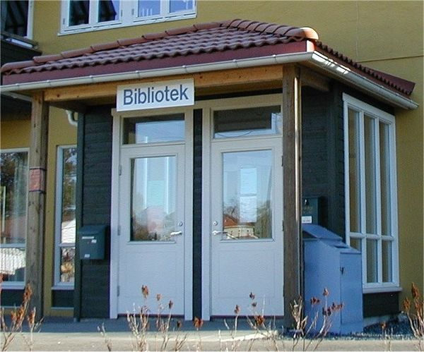 Hobøl bibliotek - landets eneste med post i bibliotek.